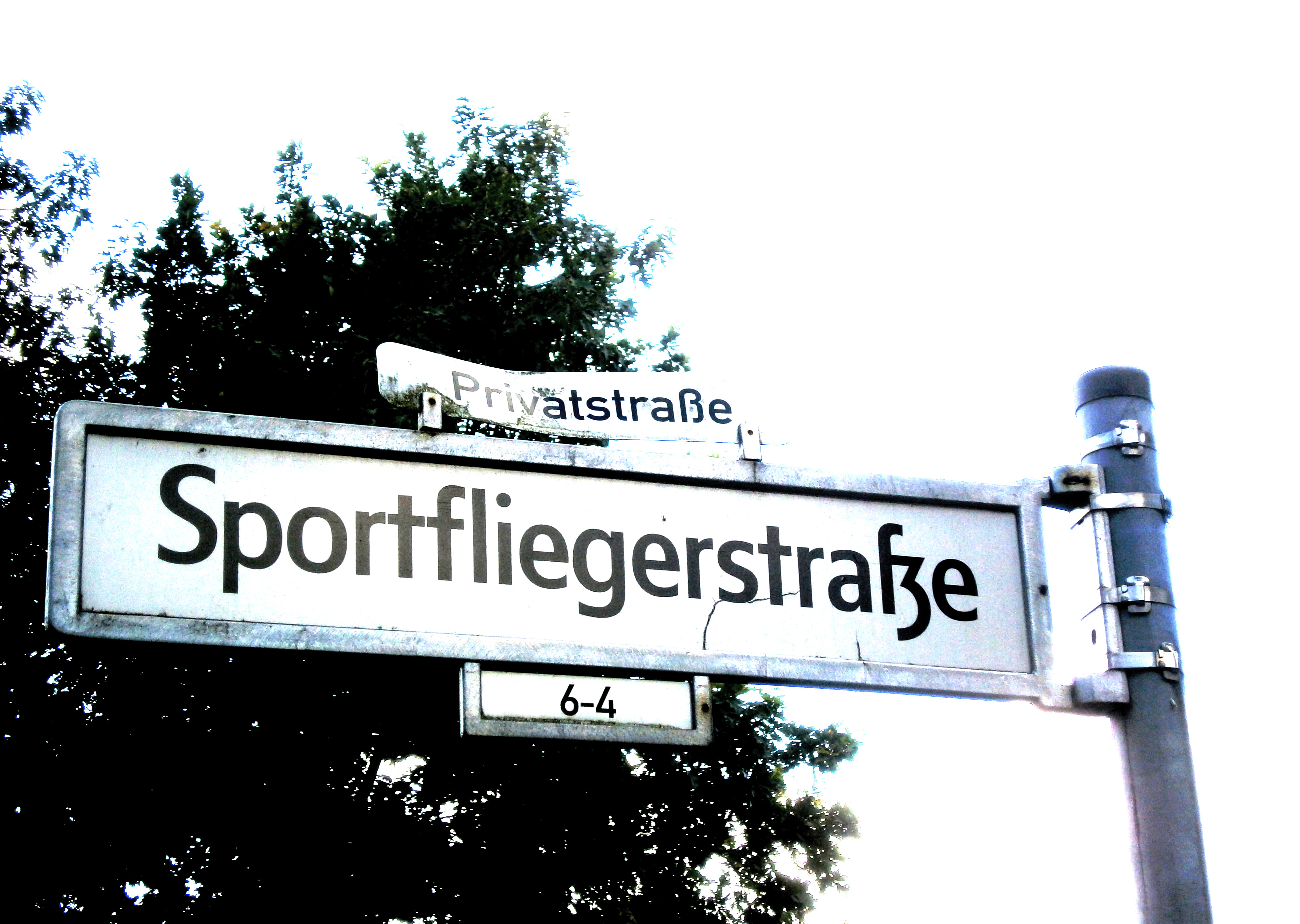 Die Sportfliegerstraße ist eine Straße in Berlin-Johannisthal. Hier Straßenschild mit Zusatz Privatstraße.